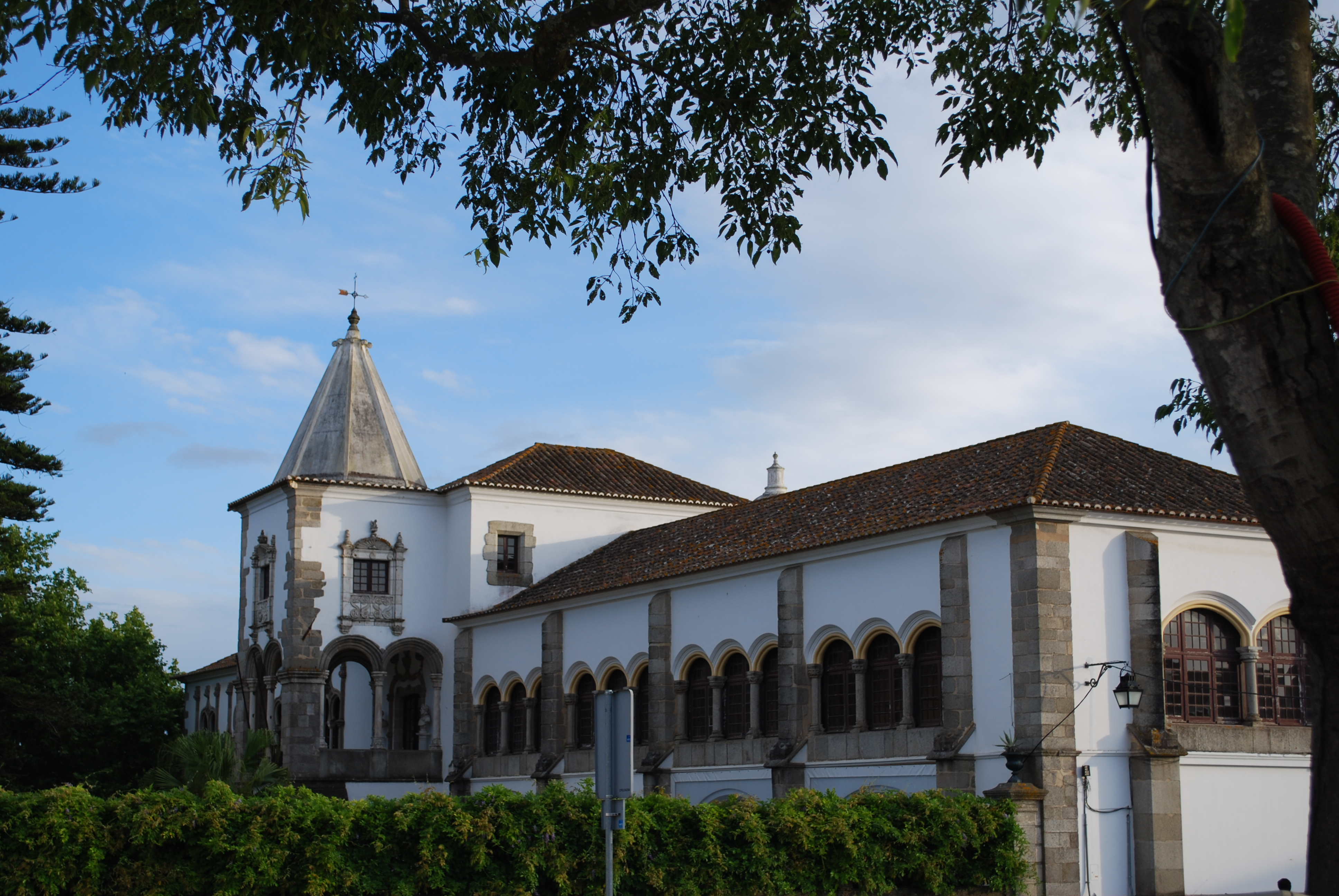 Paços de Évora (restos), Palácio de D. Manuel ou Palácio Real de São Francisco ou Paço Real de Évora